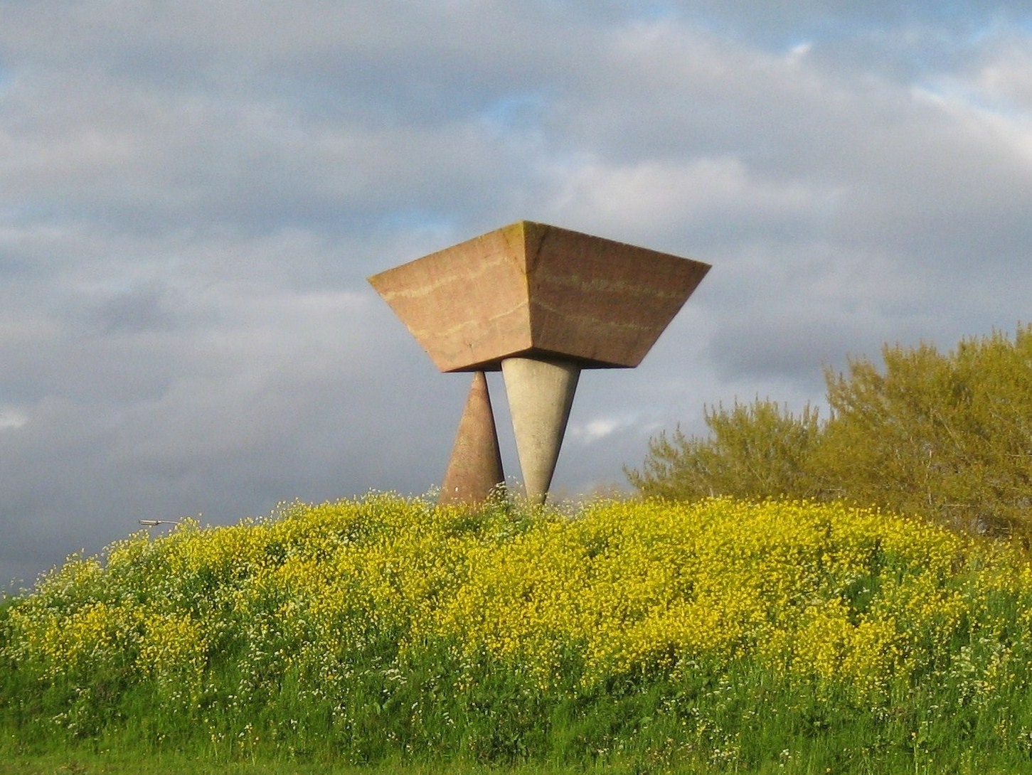 De Poort van Nieuwegein, 1994 kunstenaar Bas Maters. Eiland bij de A2 Den Bosch-Utrecht ter hoogte van Nieuwegein